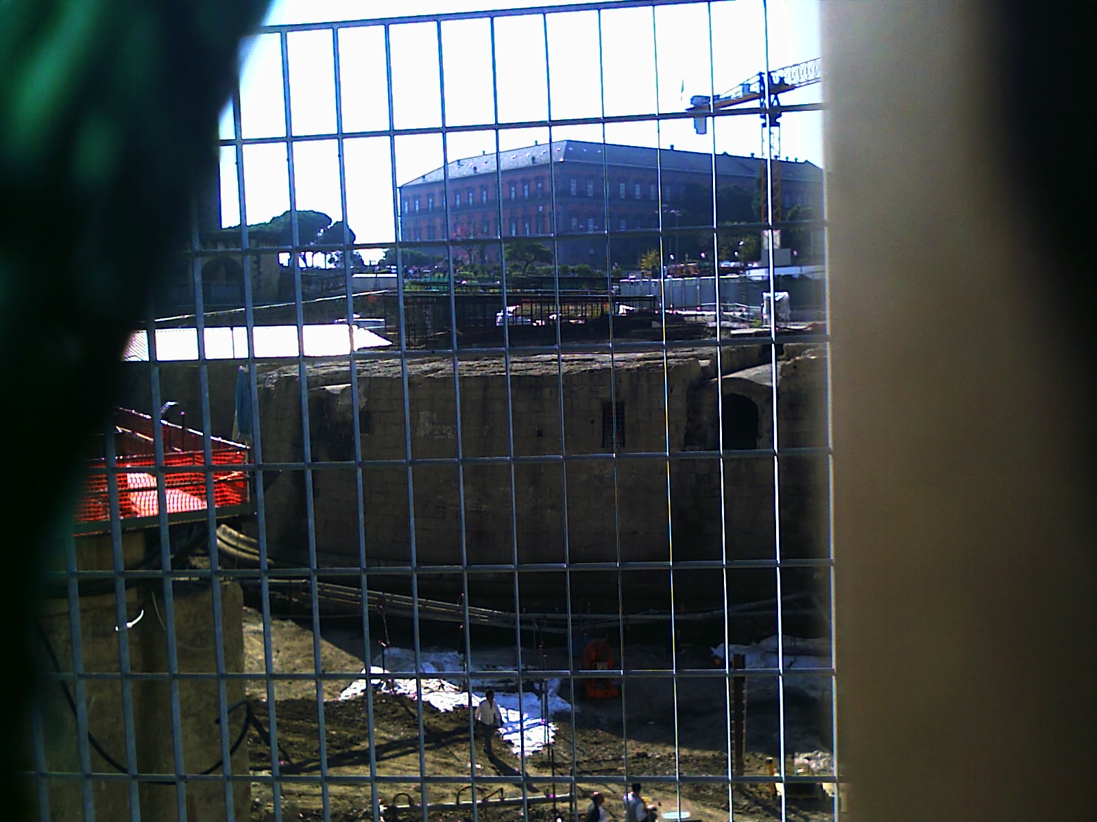 Uno dei torrioni del bastioni di Francesco di Giorgio Martini a Castelnuovo.